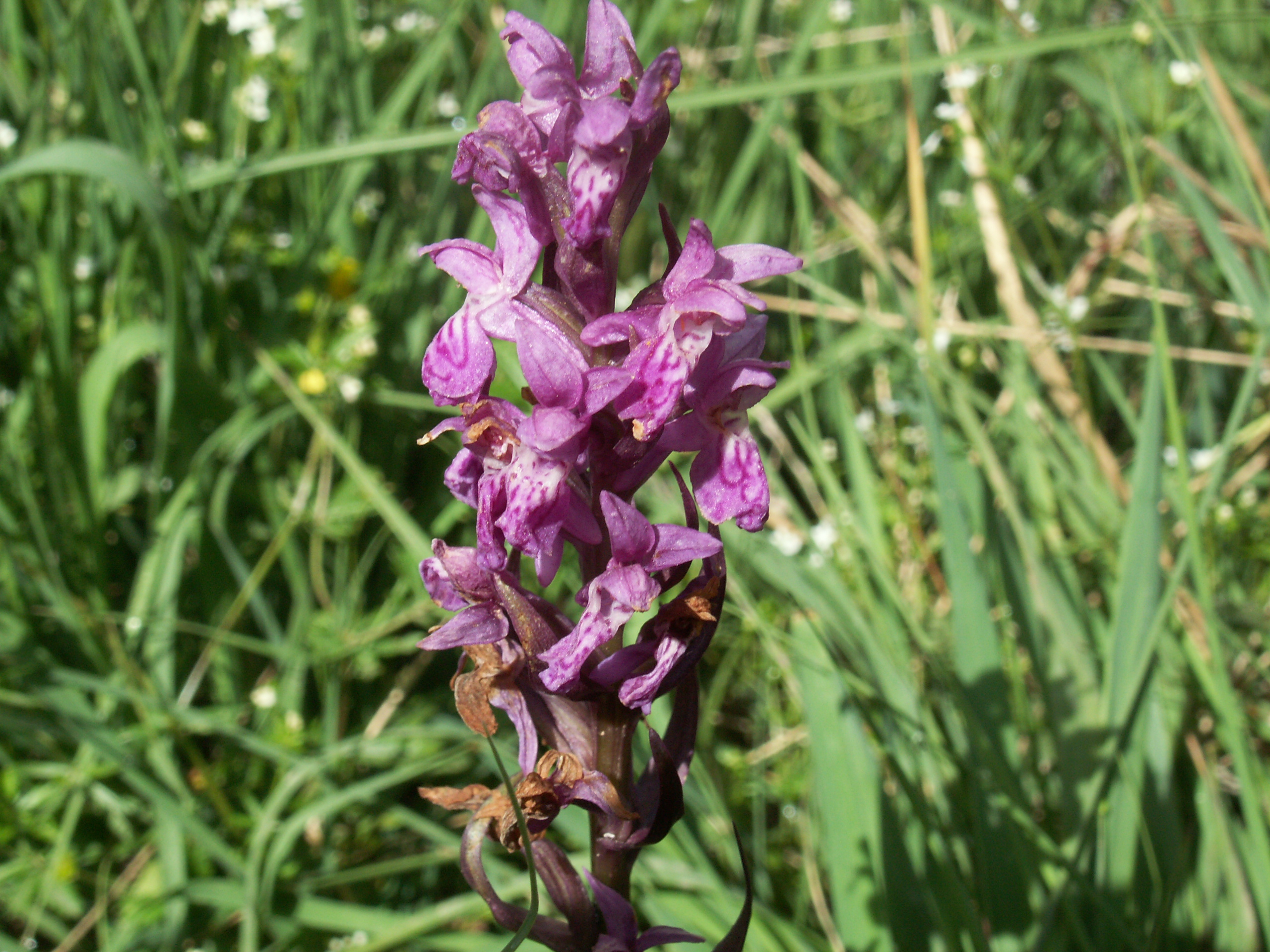 Orchis de Traunsteiner (Dactylorhiza traunsteineri) : la toubière du Peuil - France (38) Photo prise par Stéphane TASSON Date: Juin 2006